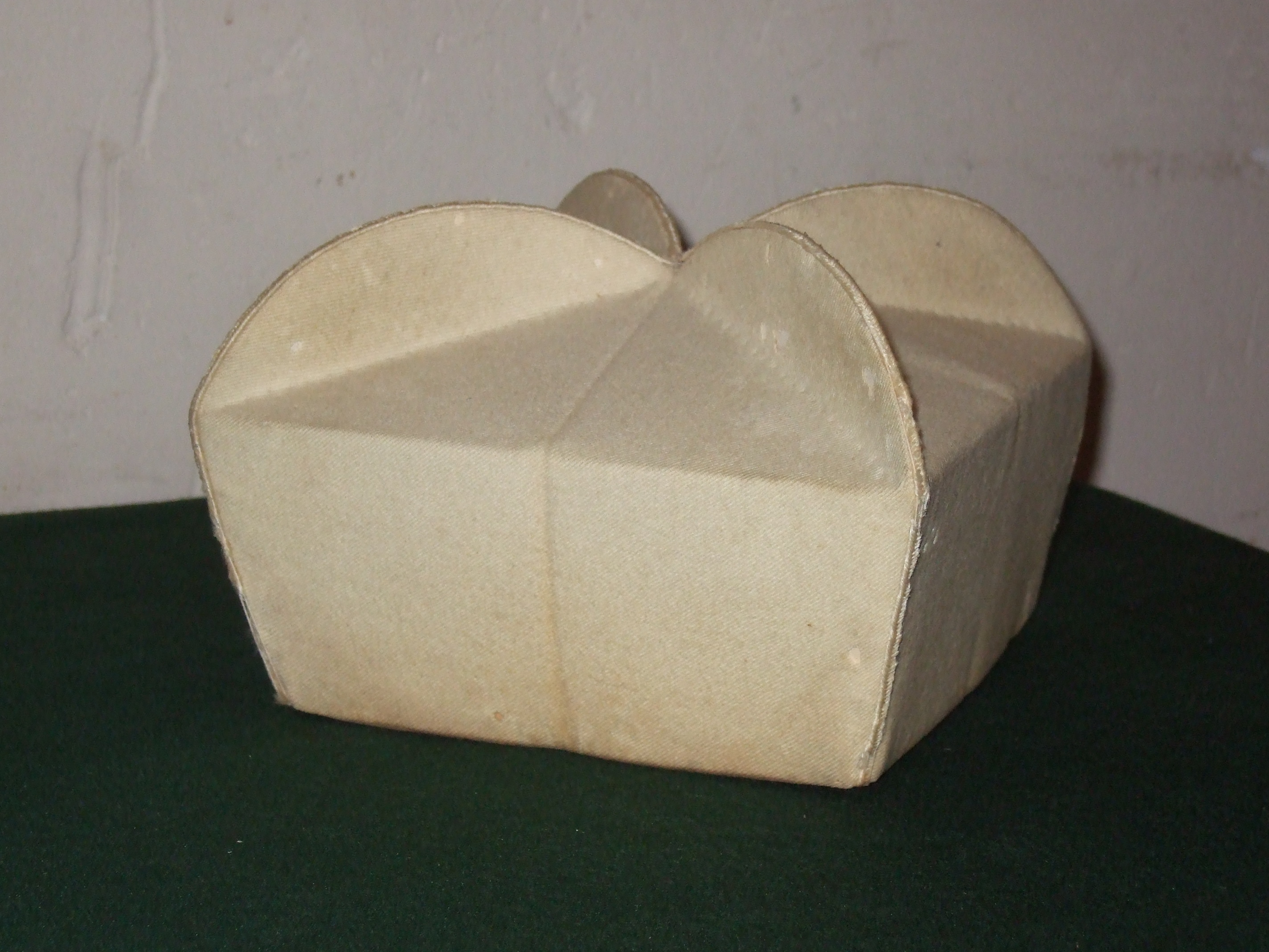 Photo de la barrette du RP Xavier de Fourvière, conservée dans l'eglise de Robion ( Vaucluse)